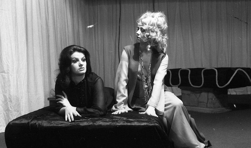 Jean Cocteau, Šola za vdove, UL AGRFT. Na fotografiji: Ljerka Belak (Vdova) in Anica Sivec (Svakinja).